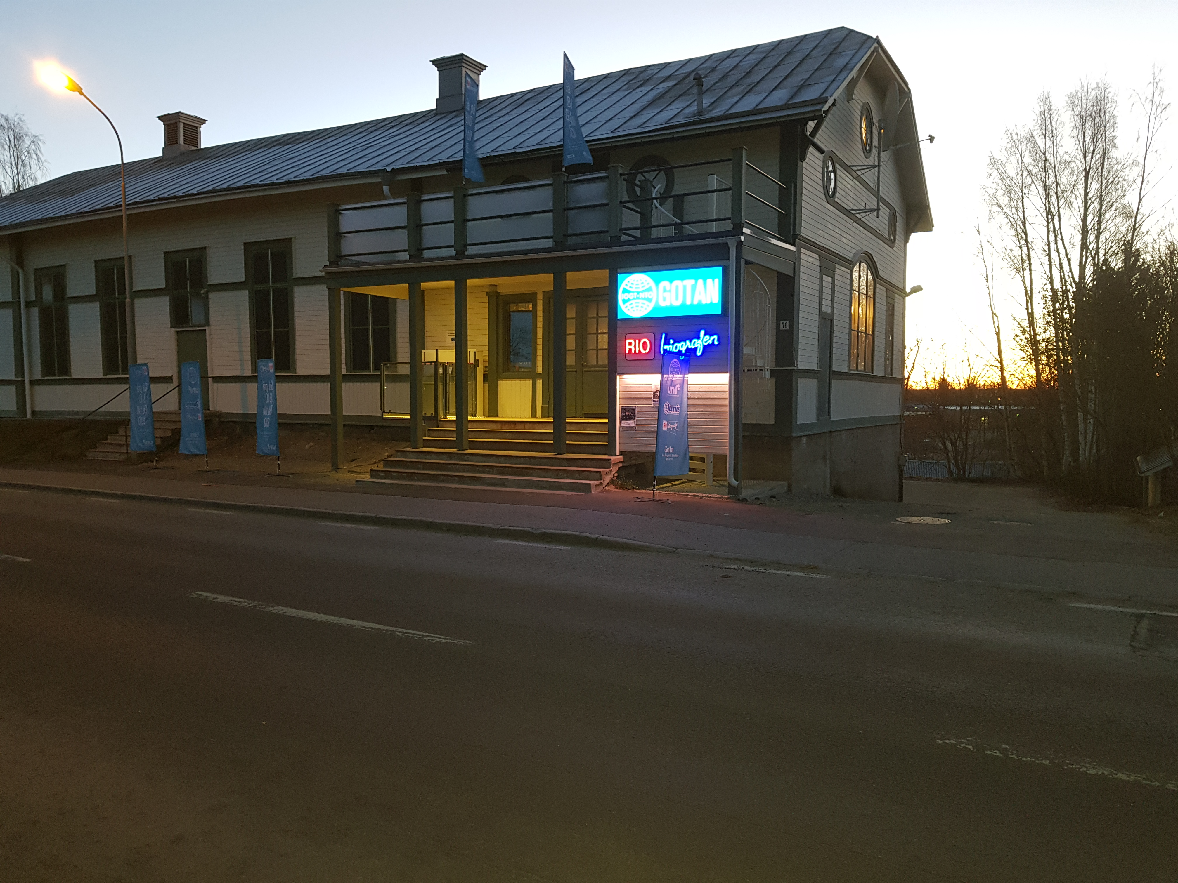 En bild på Gotan i Ockelbo